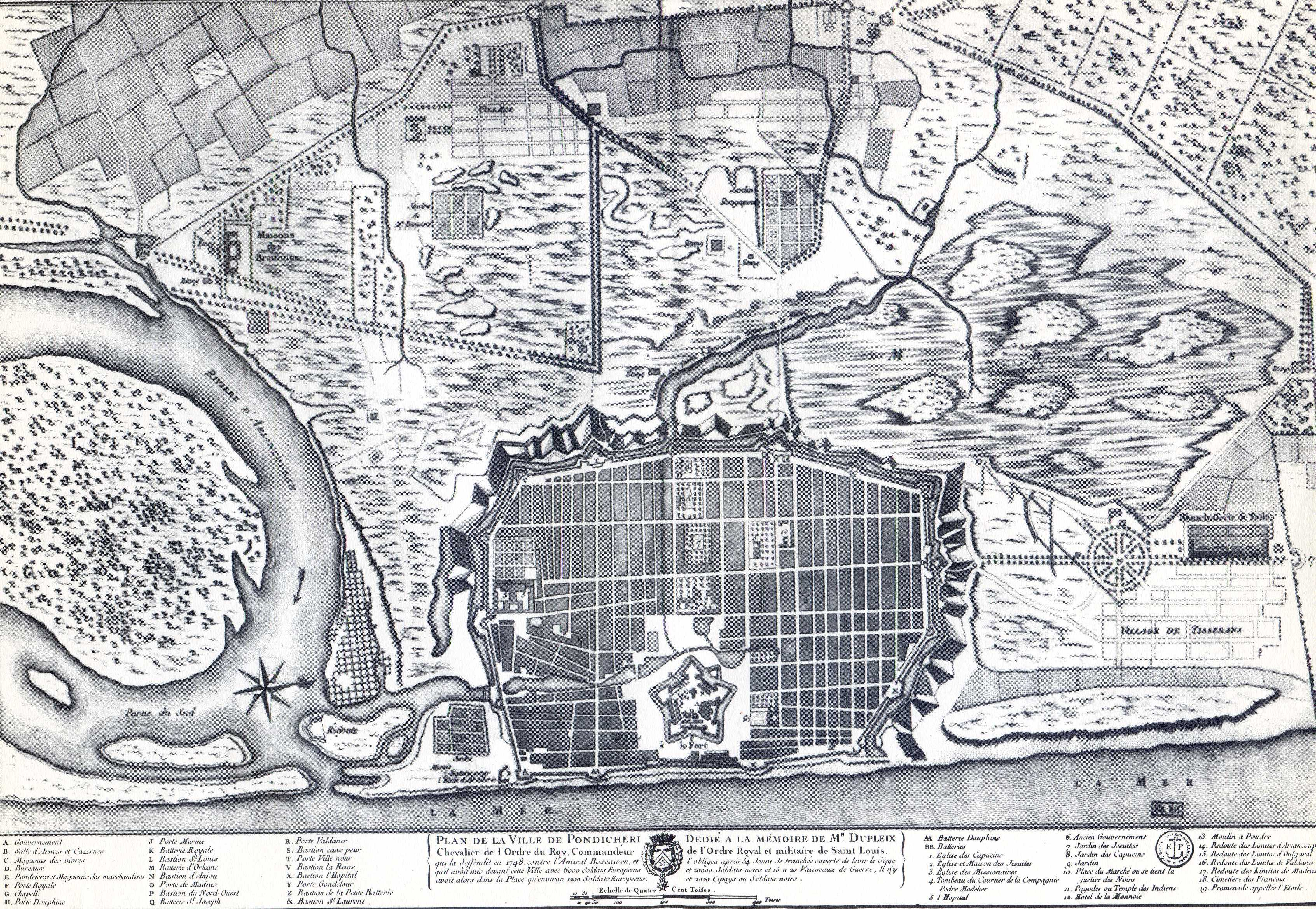 Plan de la ville de Pondichéry dédié au gouverneur général Joseph François Dupleix (XVIIIe siècle).